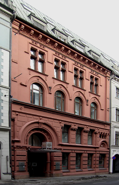 Prinsens gate 9, Oslo. Built 1899. Architect: Bernhard Steckmest.